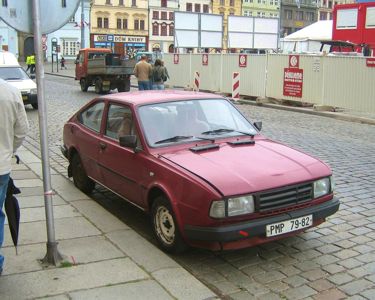 Škoda Rapid in Pilsen